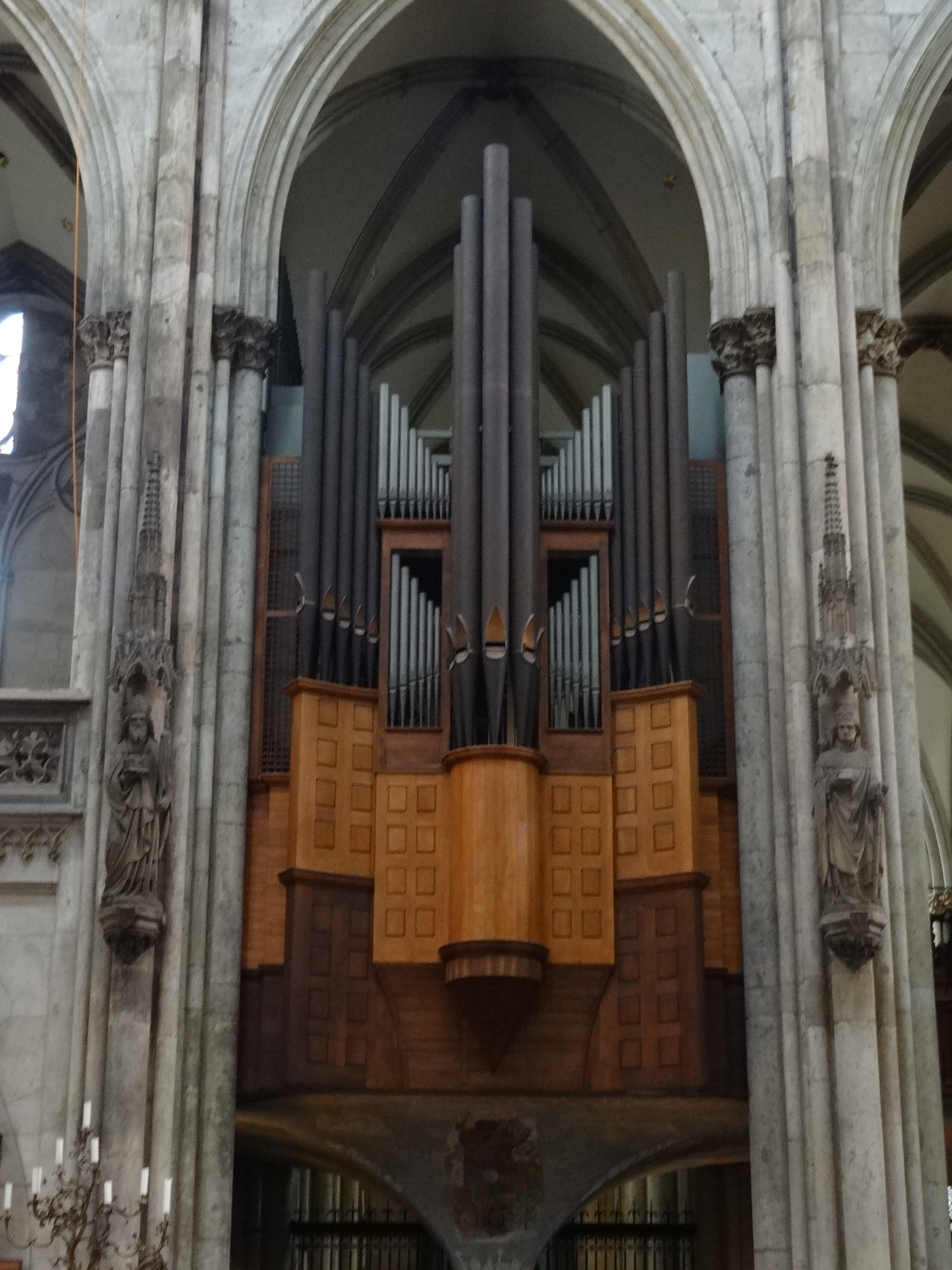 Organs in Cologne Cathedral